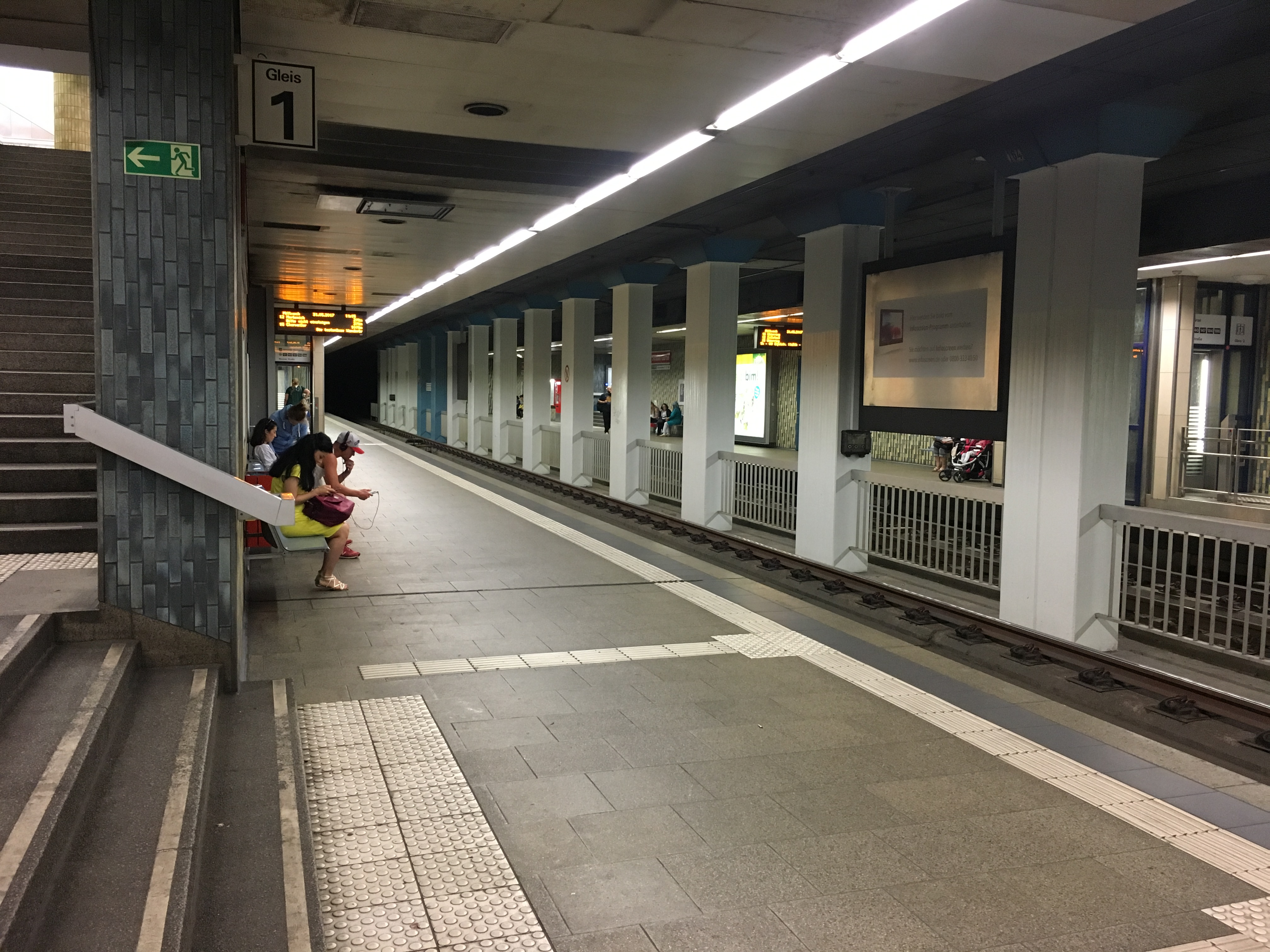 U-Bahnhof Neusser Straße/Gürtel (Köln)